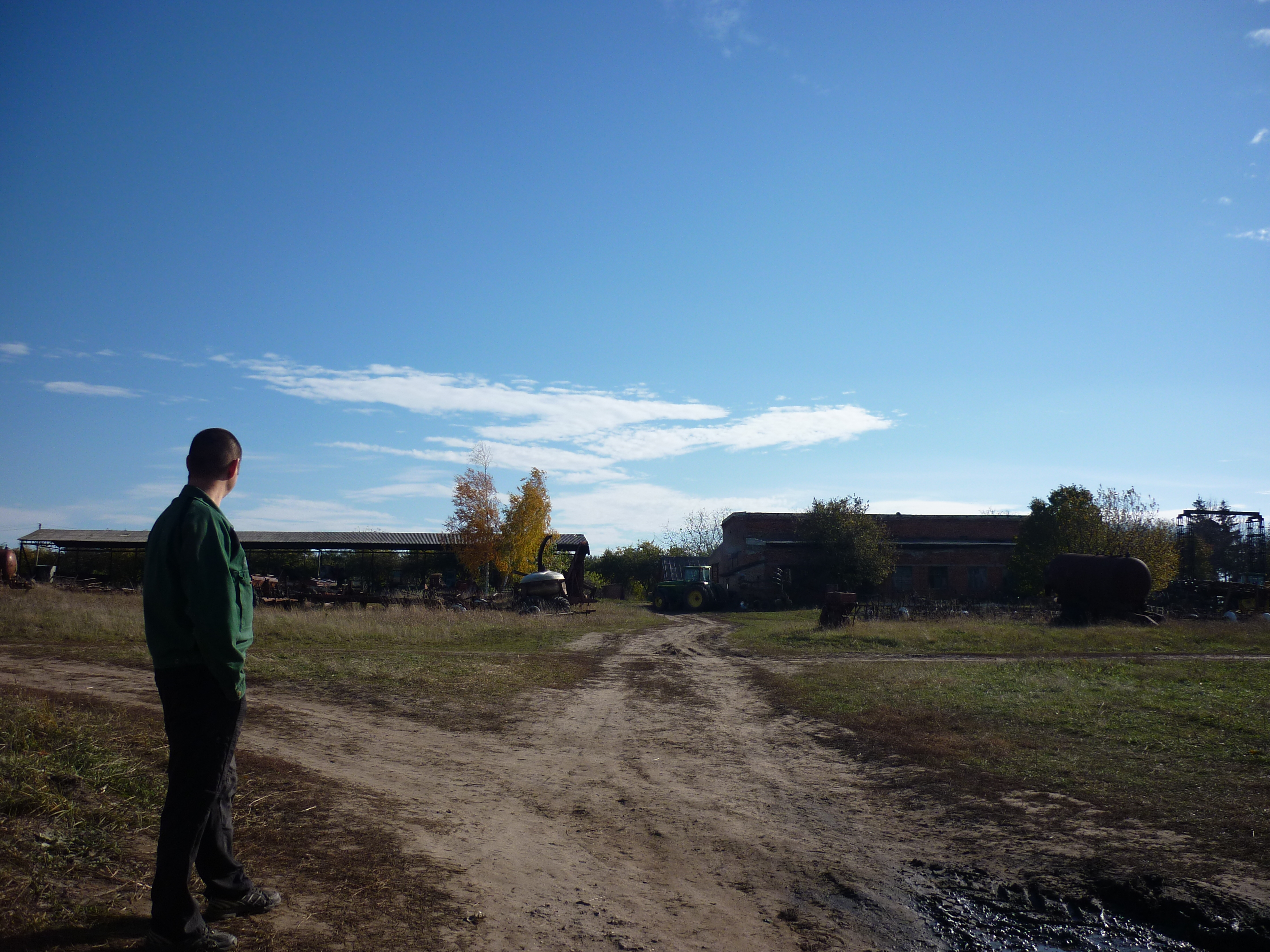 Тракторний стан в селі Головківка Чигиринського району